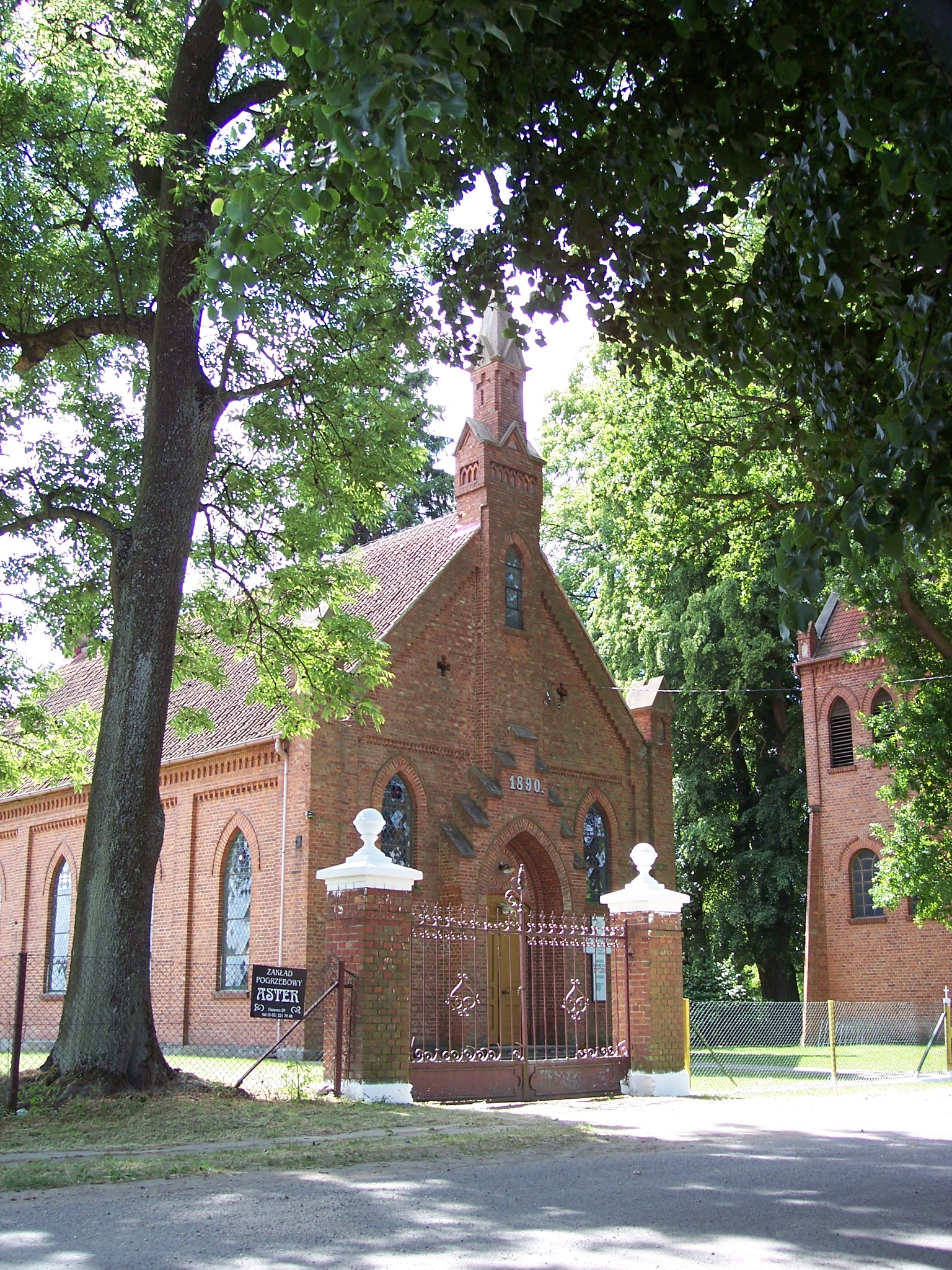 Rozgart - kościół pomennonicki, obecnie rzymskokatolicki filialny p.w. ss. Apostołów Piotra i Pawła (wzniesiony w 1890)